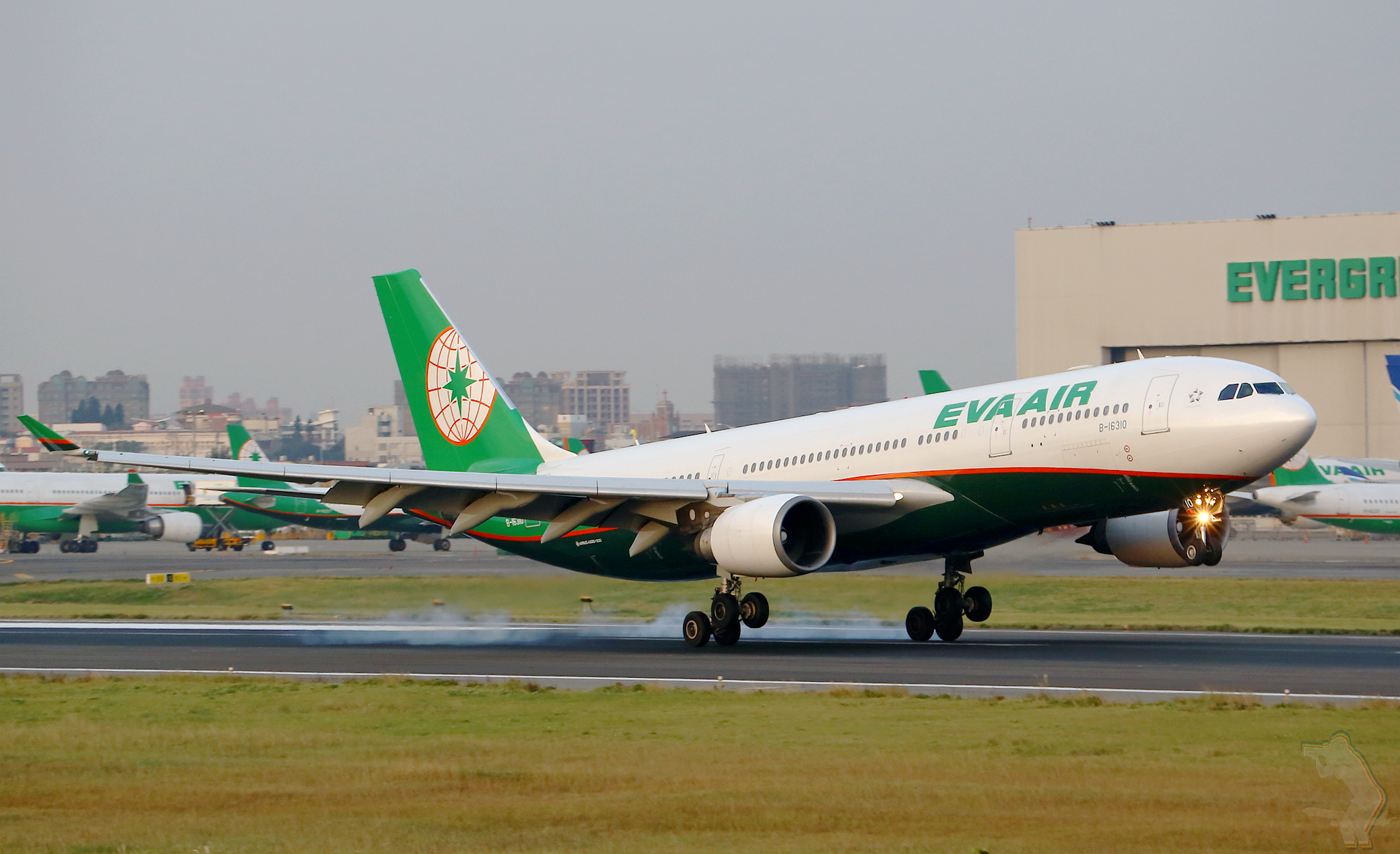 B-16310